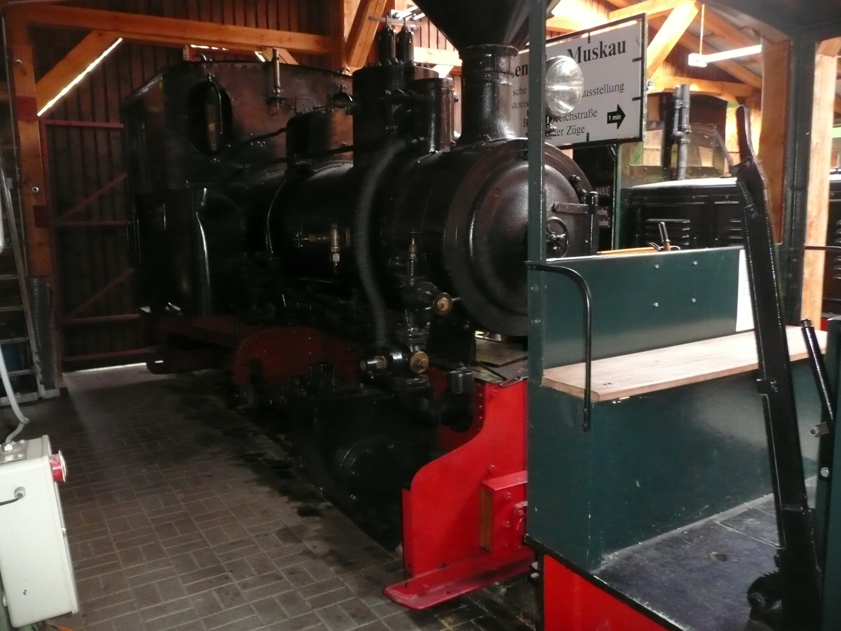 Dampflok vom Jung-Typ Hilax im Lokschuppen der WEM in Weisswasser